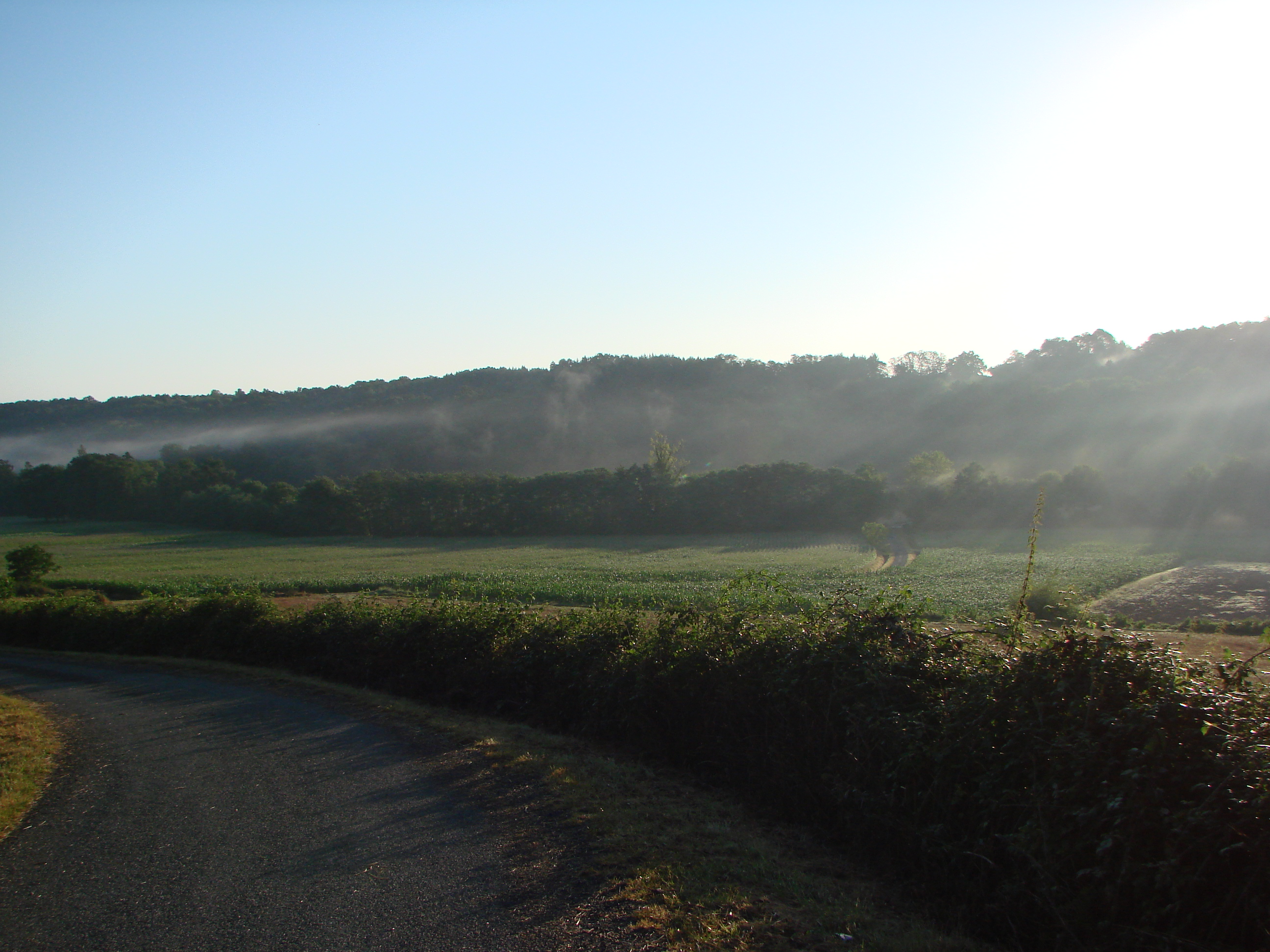 Vue du village de Dours dans les Hautes-Pyrénées (France) : Vallée de la rivière Loulès, la rivière est protégée et repérée par la rangée d'arbres au milieu de la vallée.